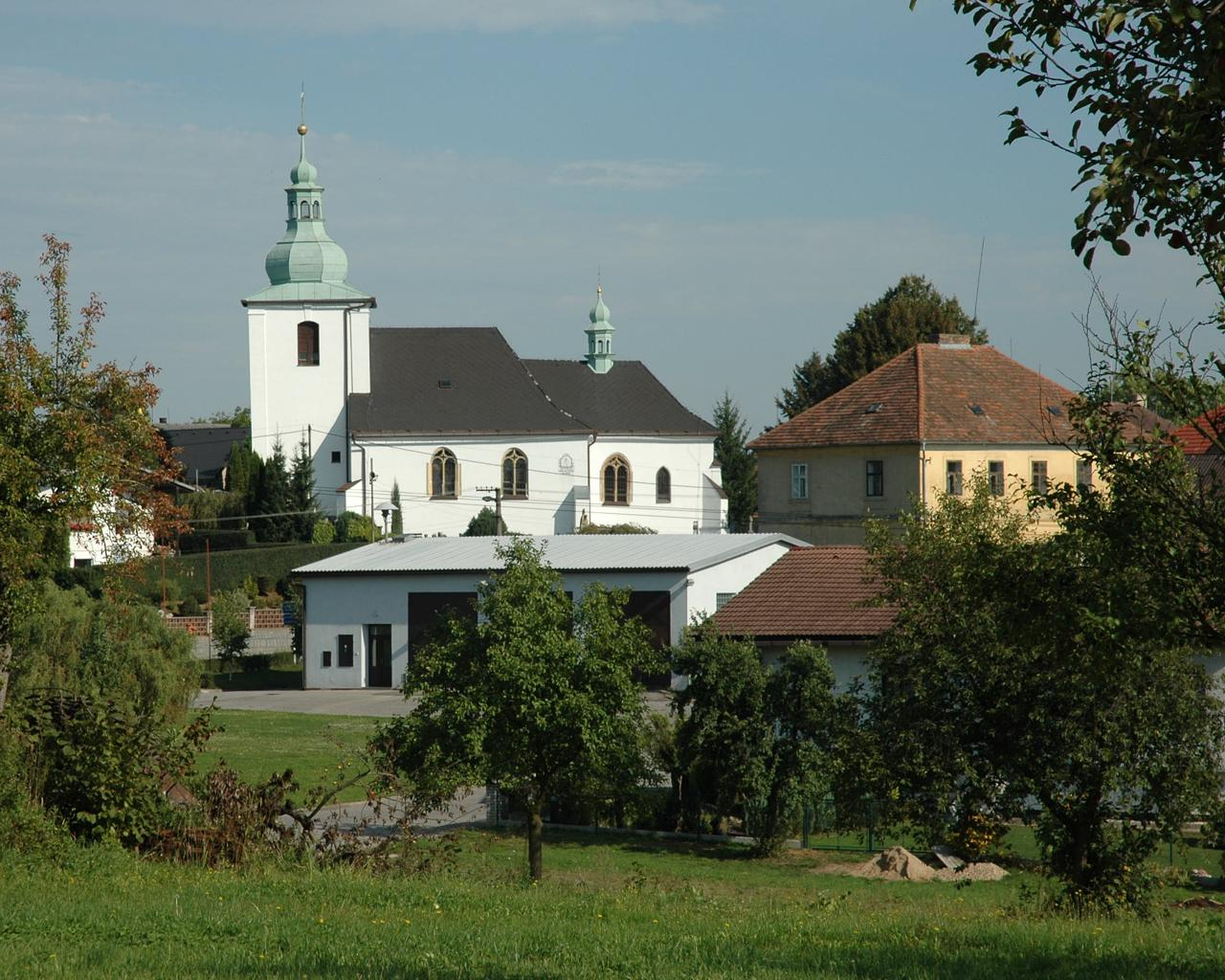 Kostel a škola, Lično)